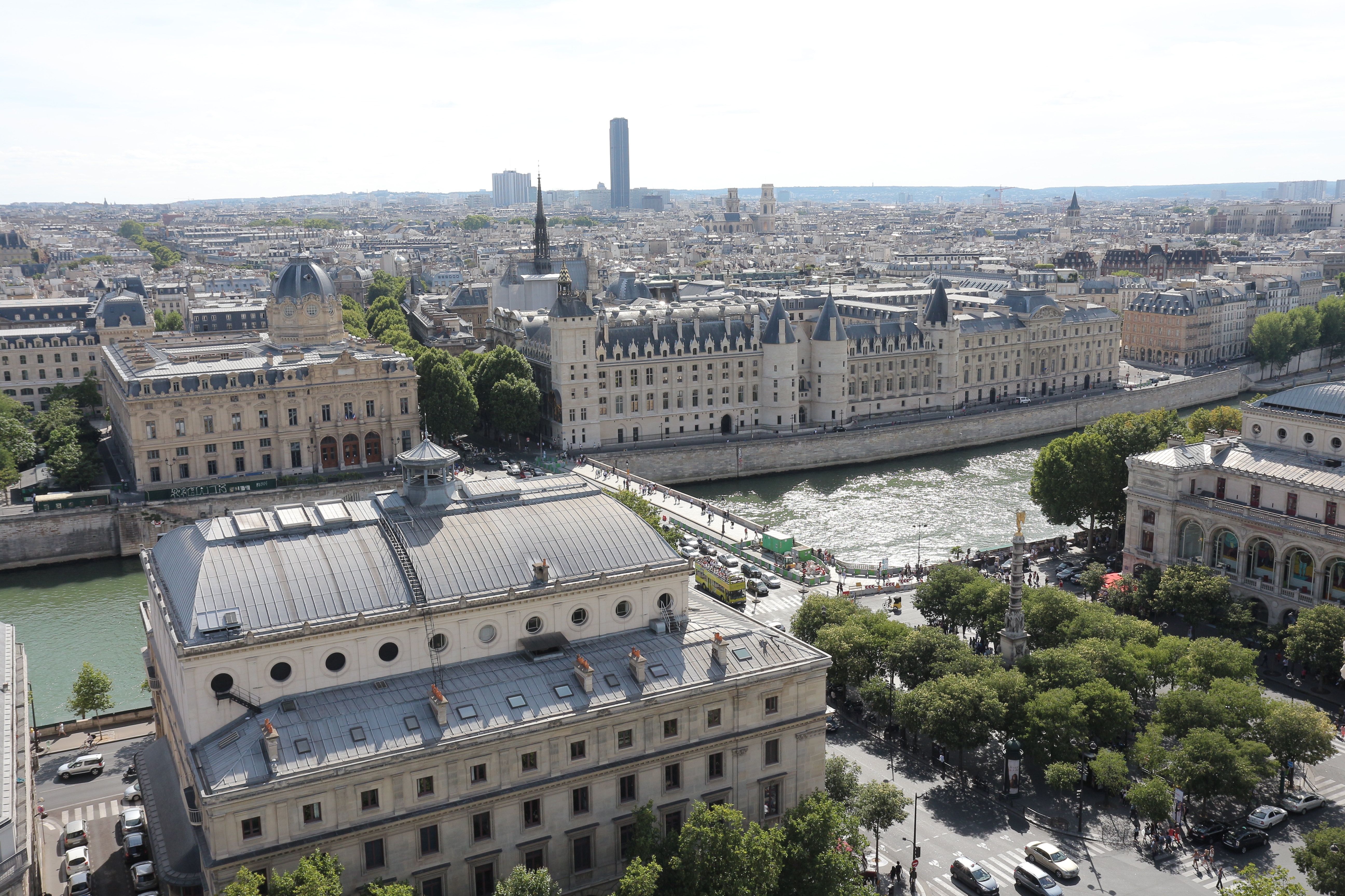 La Place du Châtelet vue depuis le sommet de la tour Saint-Jacques avec le Théâtre de la Ville, le pont au Change, le Palais de la Cité (Conciergerie) et le Théâtre du Châtelet